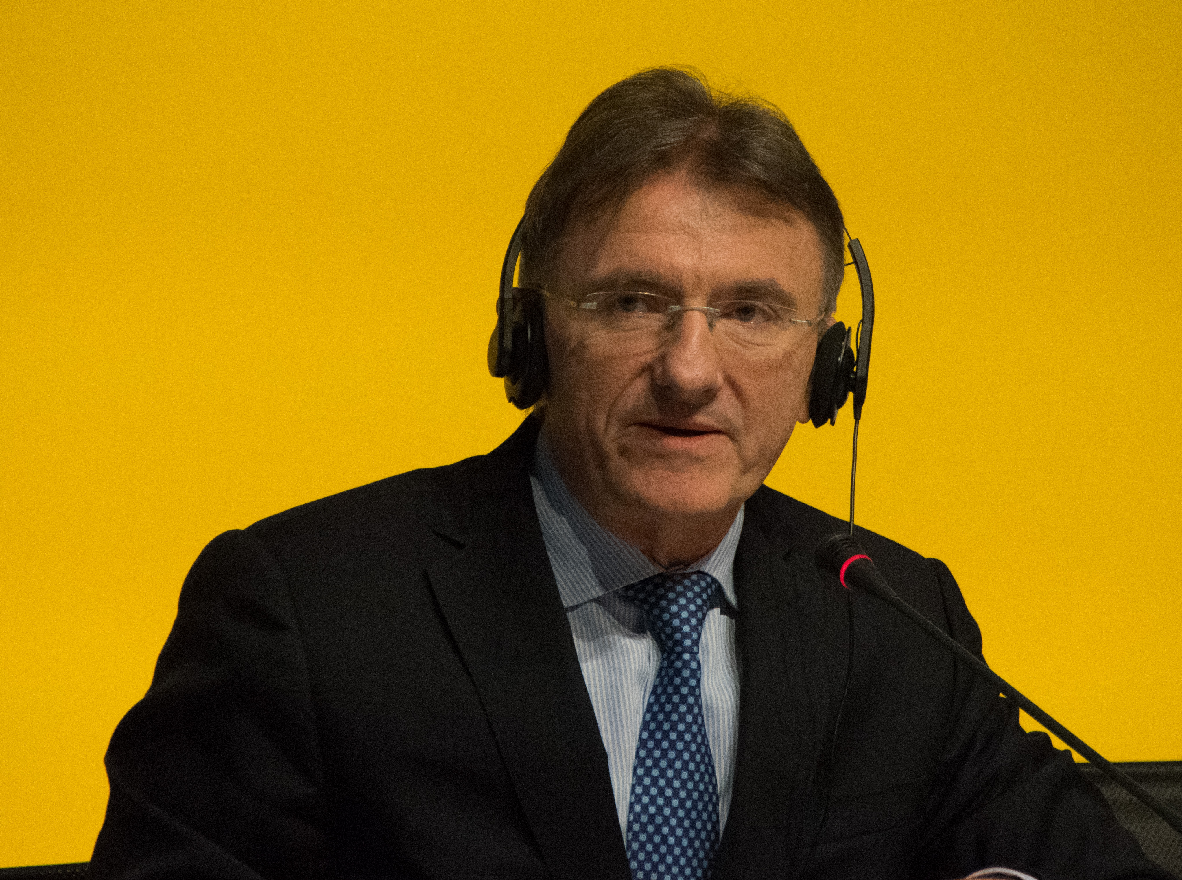 Ken Allen, Vorstand Deutsche Post DHL Group